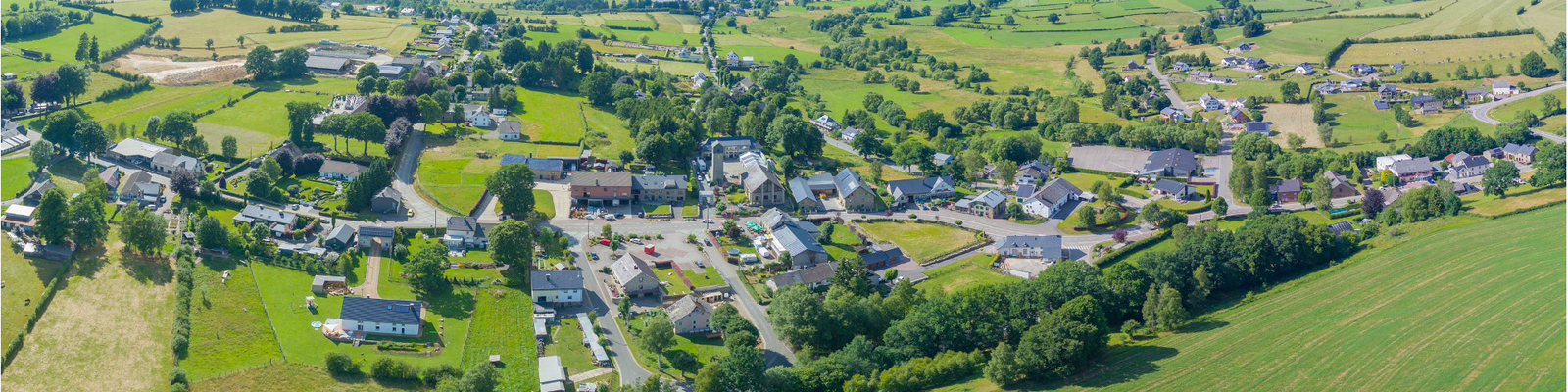 photographie aérienne de Deidenberg, commune d'Amblève